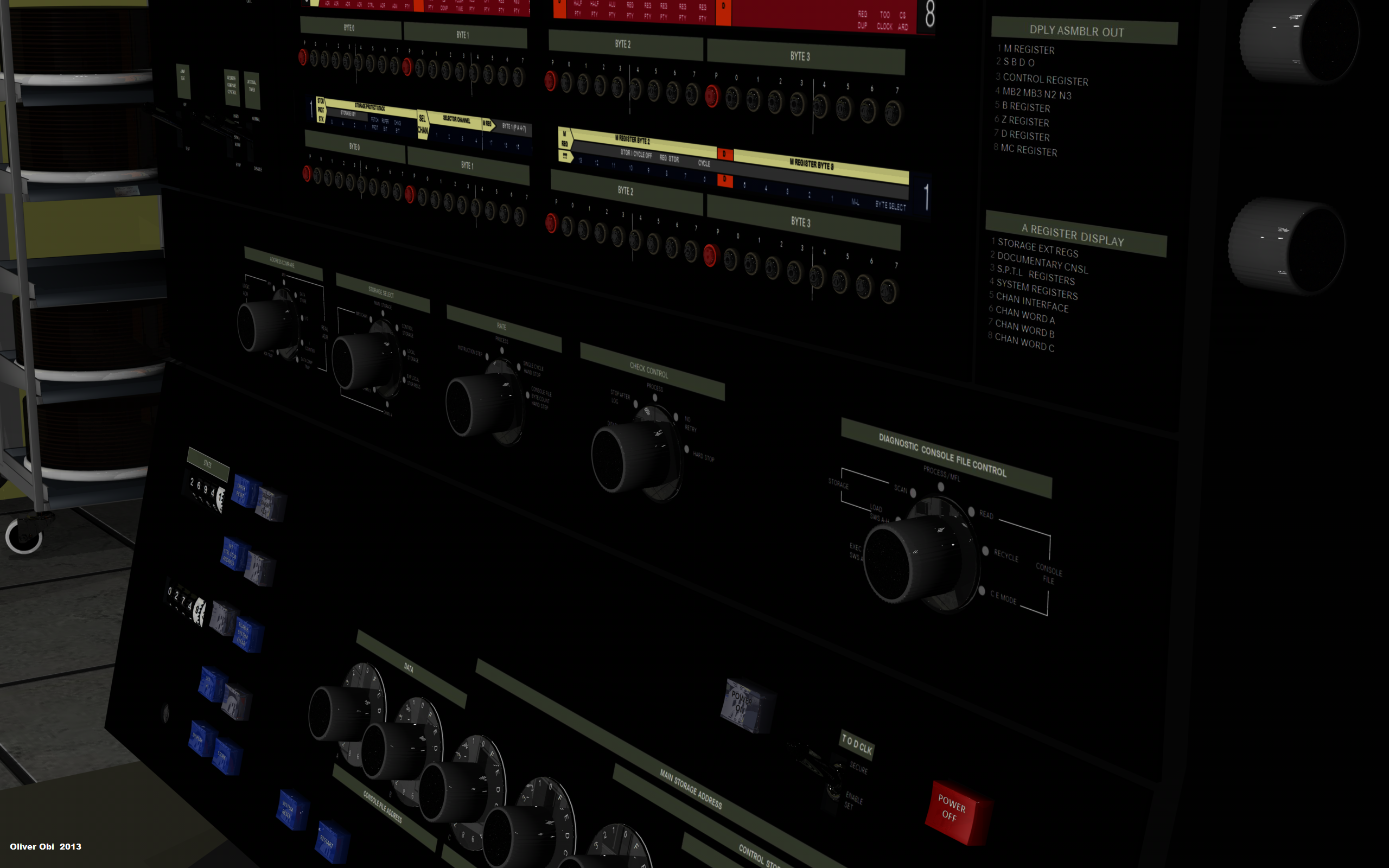 Detailansicht der Systemkonsole